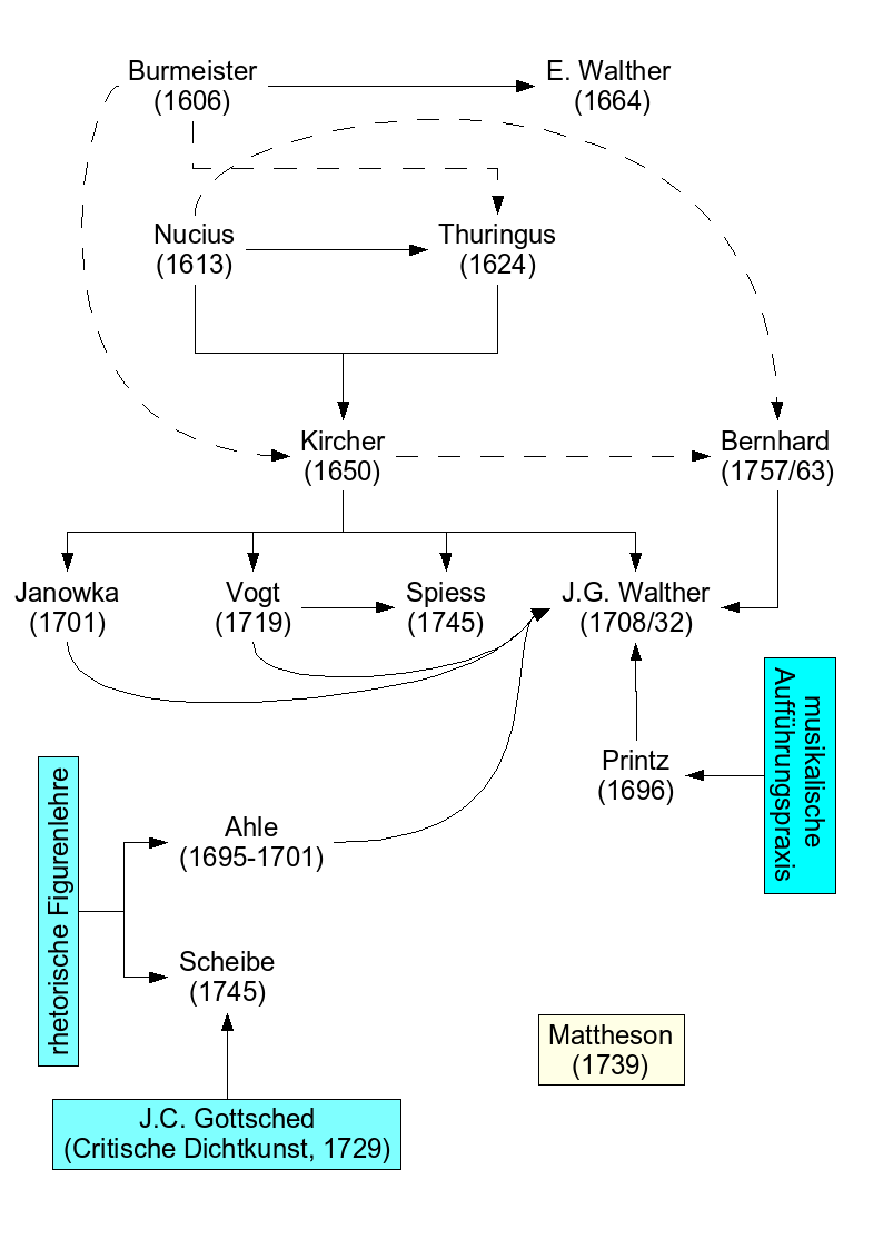 Graphische Darstellung der Beziehungen zwischen verschiedenen Figurenkatalogen